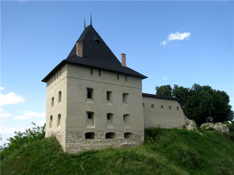 Галицький замок в Галичі (Україна, Івано-Франківська обл.)